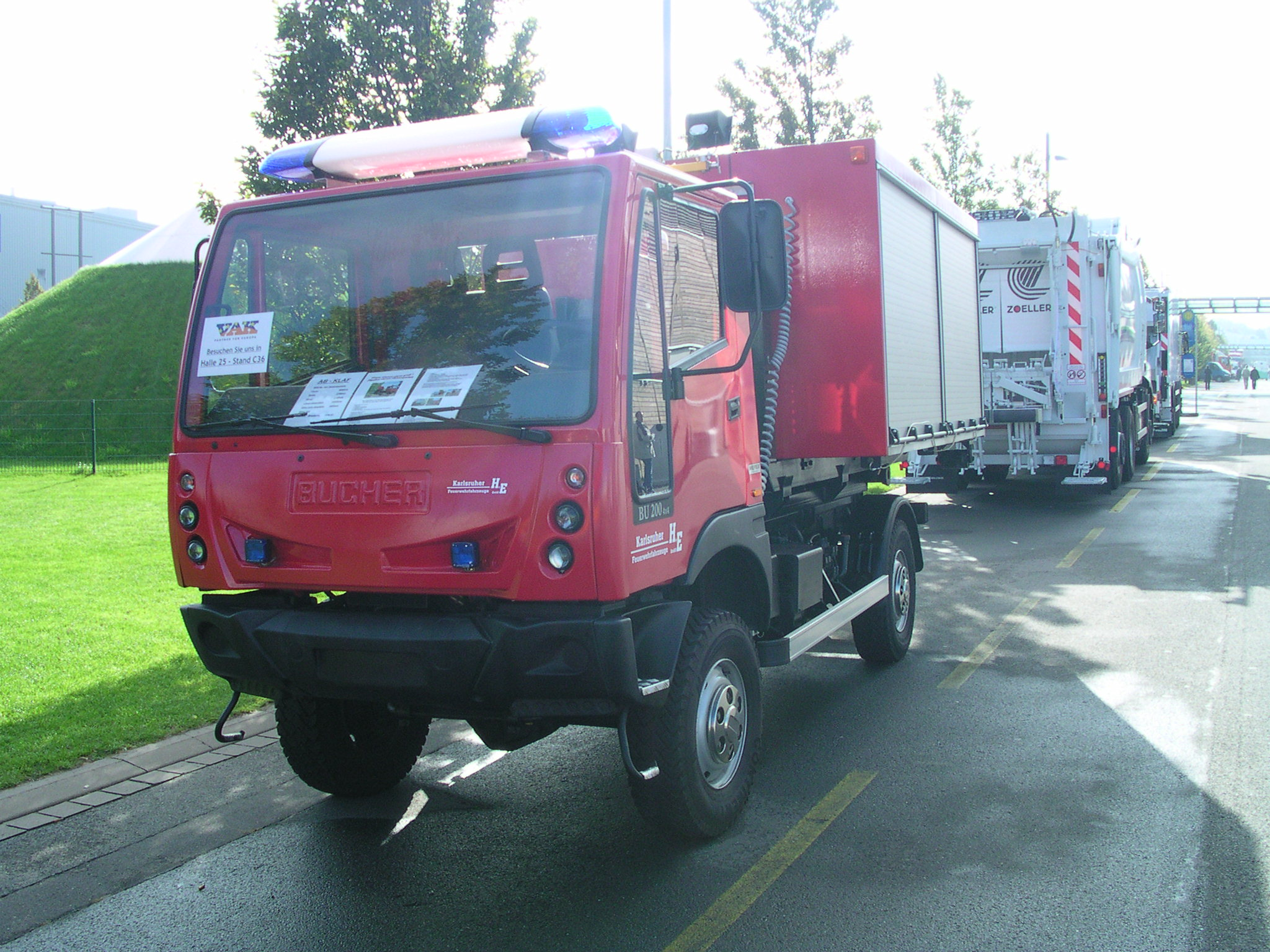 Nutzfahrzeug-IAA 2004 in Hannover, Bucher-Feuerwehrwagen BU 200 4*4 mit Abrollbehälter der Karlsruher Feuerwehrfahrzeuge H&E GmbH